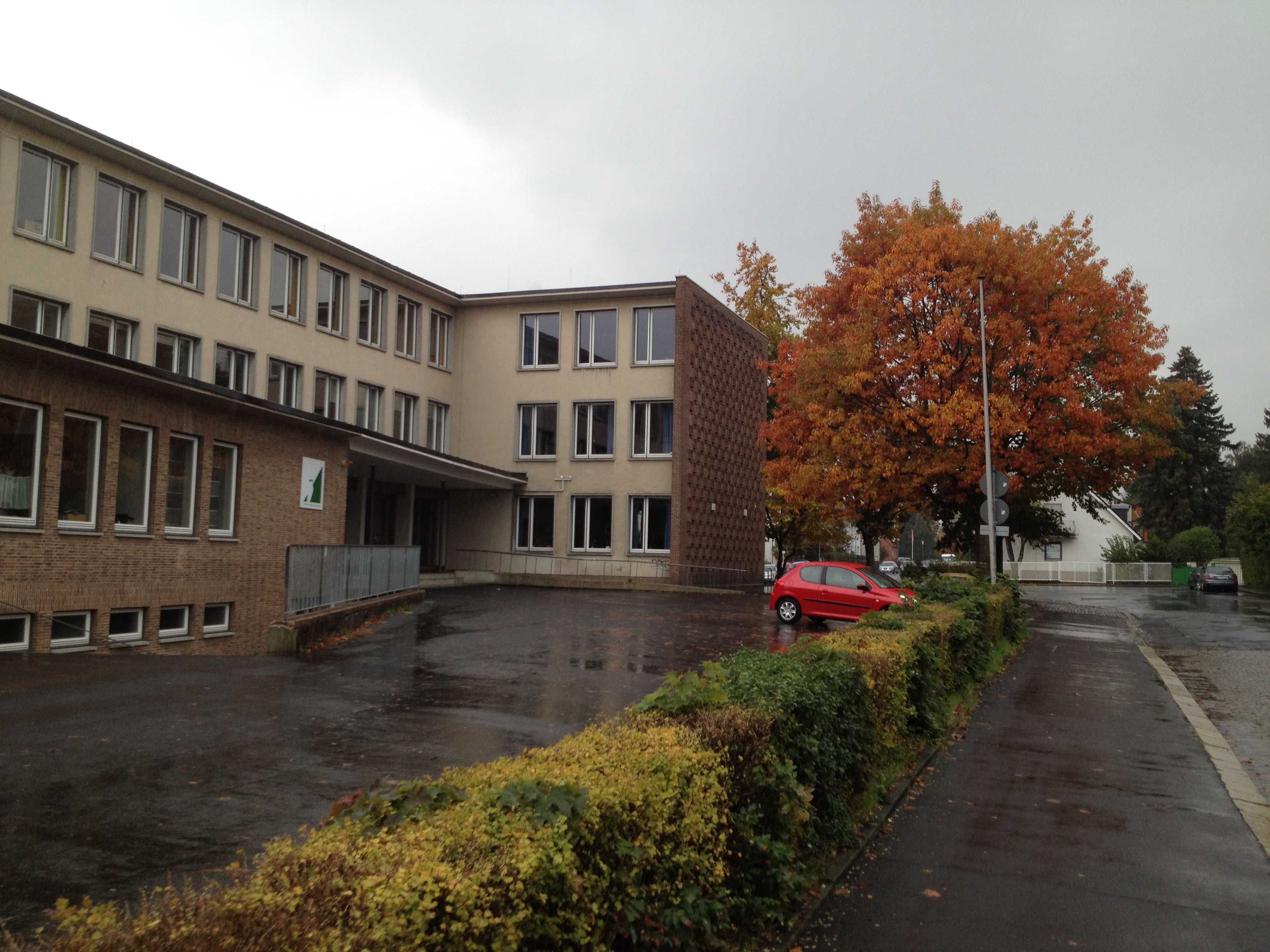 Haupteingang des Wilhelmsgymnasium Kassel; EntdeckerRunde Kassel